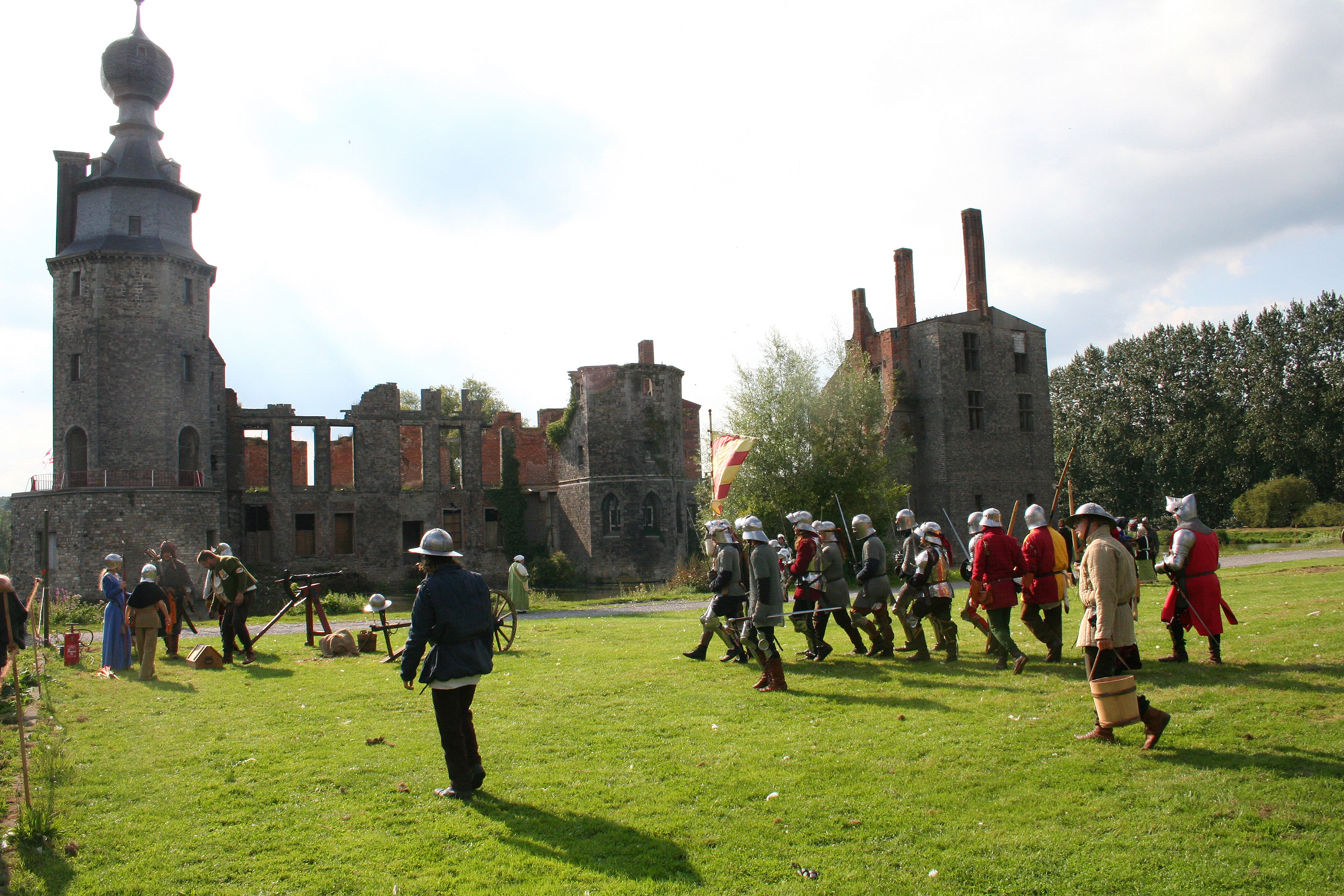 Havré (Belgique), reconstitution historique de la prise du château des princes de Croÿ en 1521.